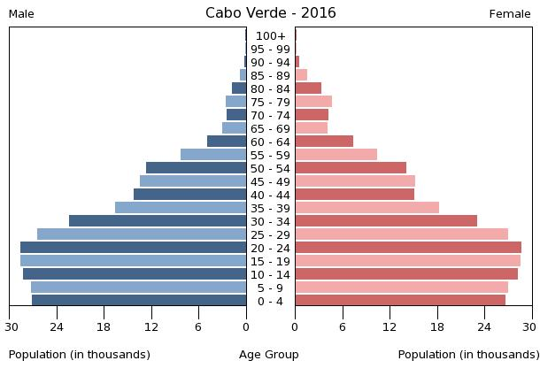 A population pyramid illustrates the age and sex structure of a country's population and may provide insights about political and social stability, as well as economic development. The population is distributed along the horizontal axis, with males shown on the left and females on the right. The male and female populations are broken down into 5-year age groups represented as horizontal bars along the vertical axis, with the youngest age groups at the bottom and the oldest at the top. The shape of the population pyramid gradually evolves over time based on fertility, mortality, and international migration trends.